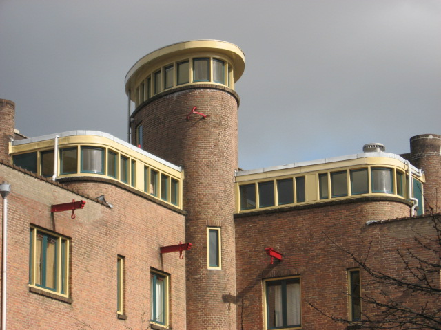 Saffierstraat 61, Amsterdam, detail van een woningcomplex van architect Van Epen. Gevel met de voor Van Epen kenmerkende geel-groene raamkozijnen, en geaccentueerde hijsbalken.